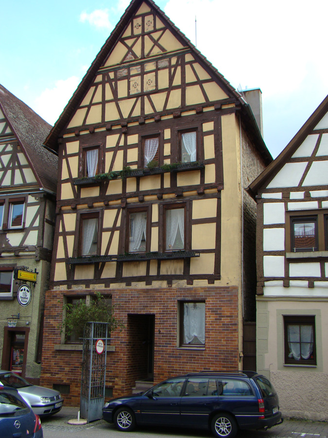 Historisches Gebäude Altstadtstraße 2 in Eppingen